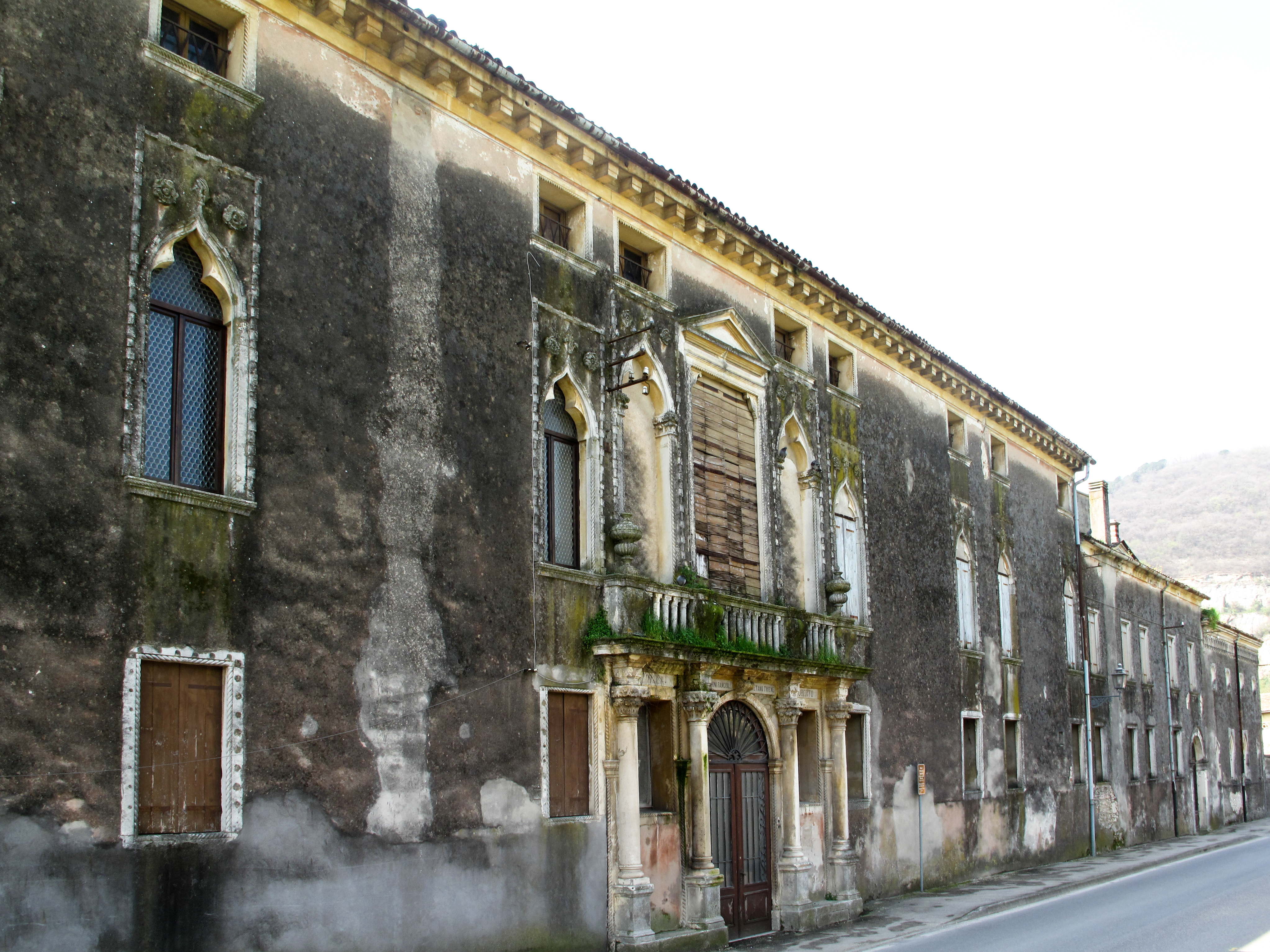 Costozza di Longare - Casa dei Buoni Fanciulli